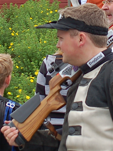 Vebjørn Berg at Landsskytterstevnet 2007